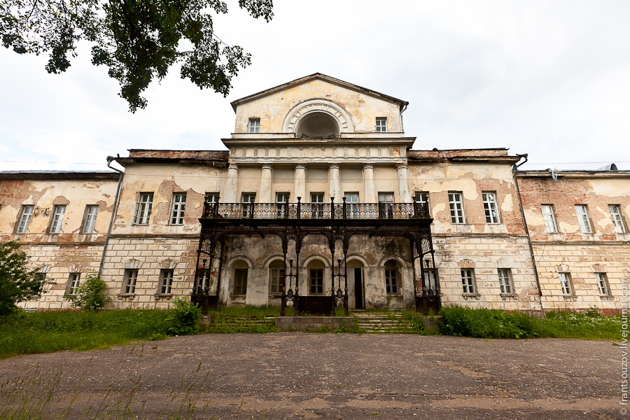 Главный дом (дворец) (Смоленская область, Дорогобуж, село Алексино)